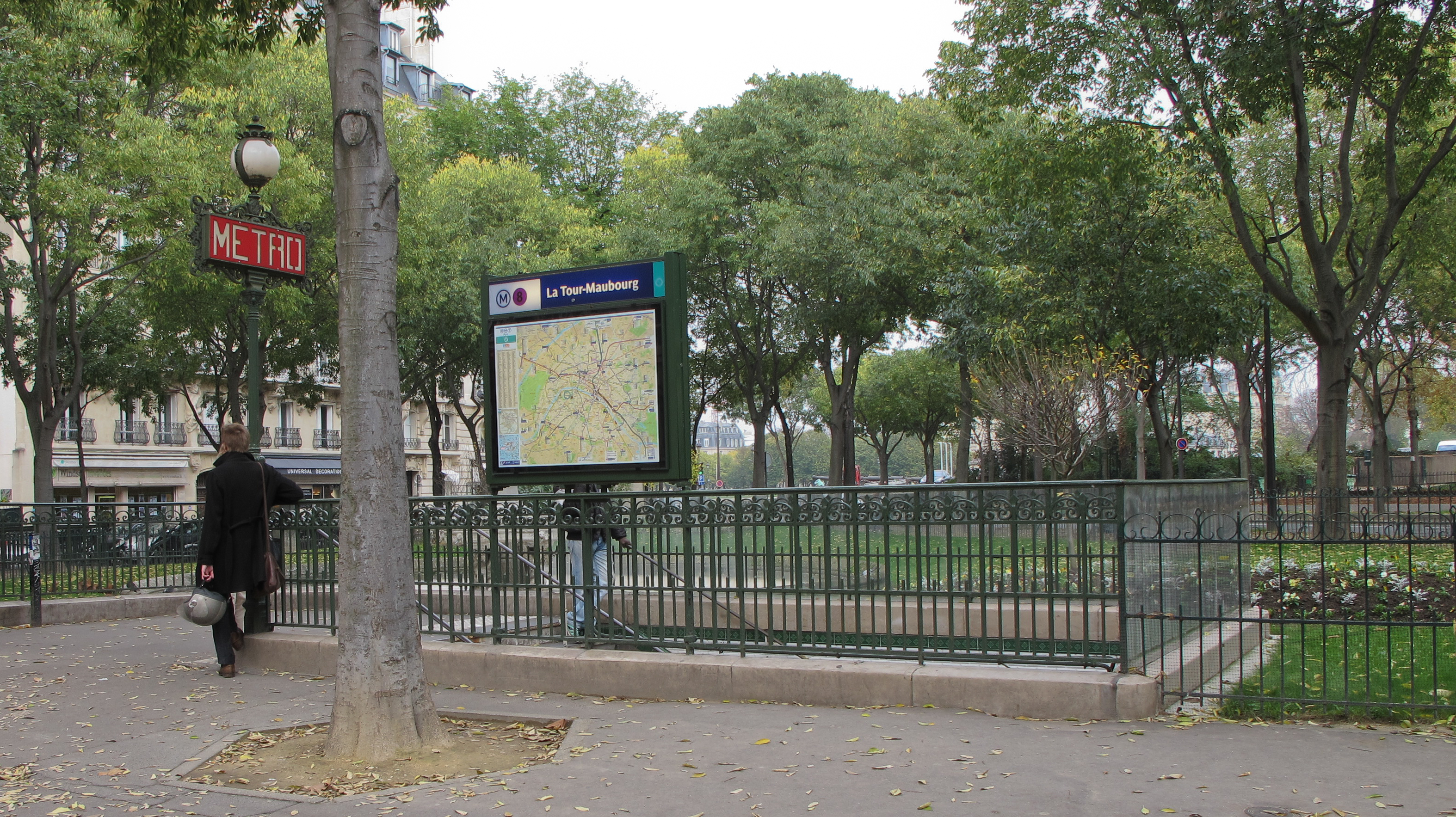 Station de métro La Tour Maubourg, métro de Paris, France